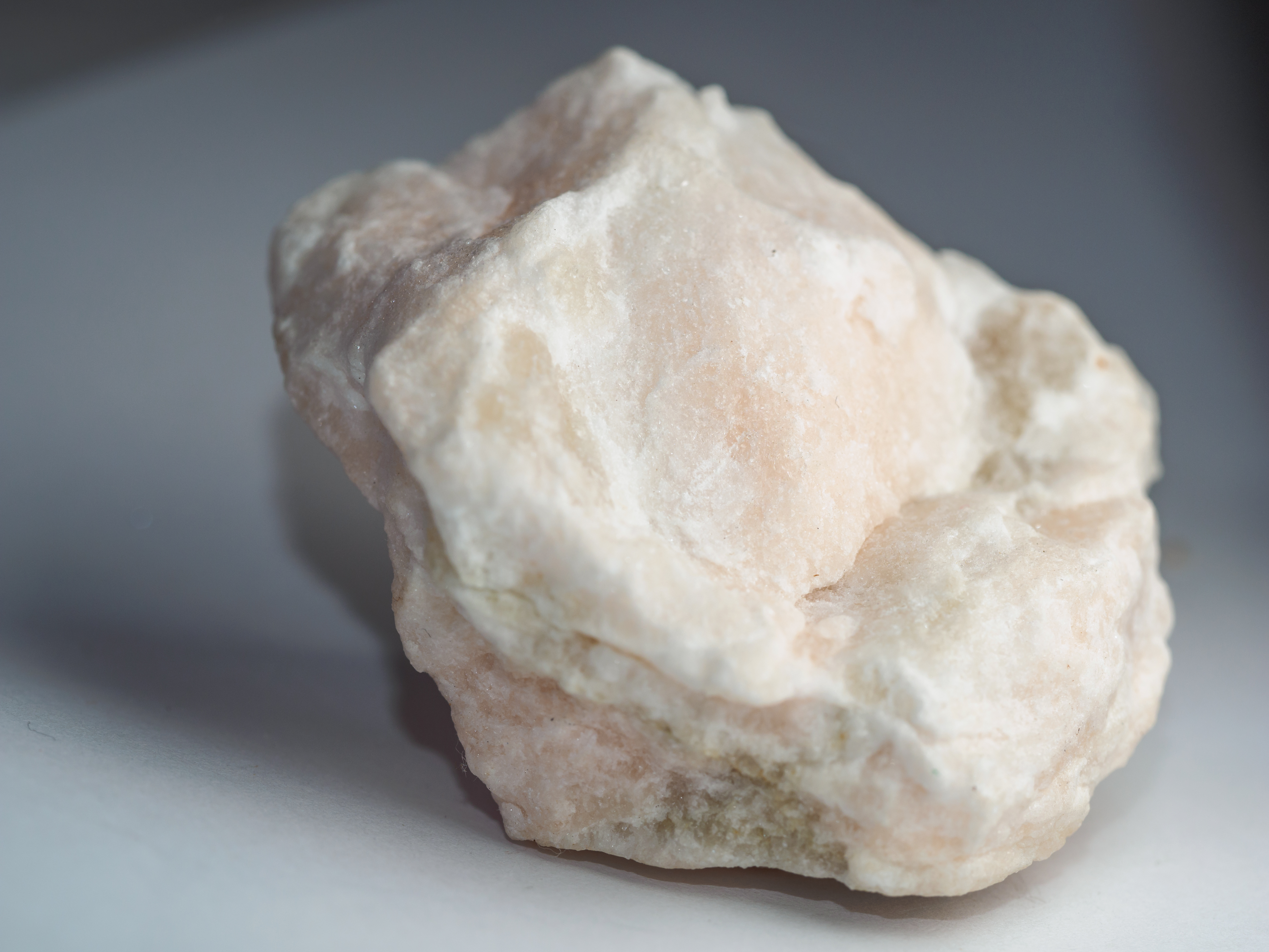 Alabaster